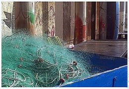 Antzina, Santurtzin "Bolintxeak" esaten zitzaion, bolintxei ez eze, arrantzaleen tresnak, sareak-eta gordetzeko tokiari ere. Hori guztia eraitsi, eta etxebizitzak eraiki zituzten haren lekuan. Gaur egun, beste toki bat dugu, portuan: bodegak.